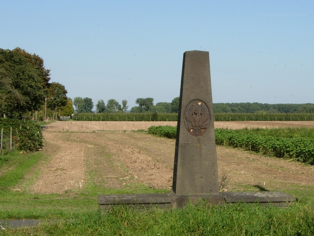 Preußischer Meilenstein, Kölnstraße/Engländerweg, Bonn-Auerberg (Grenze Buschdorf)